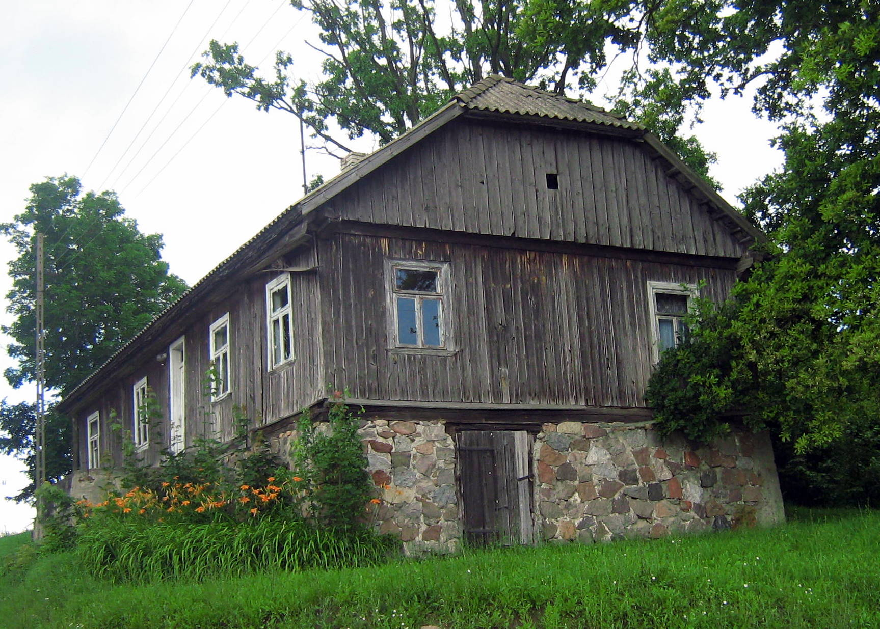 Chałupa w Majewie Kościelnym.